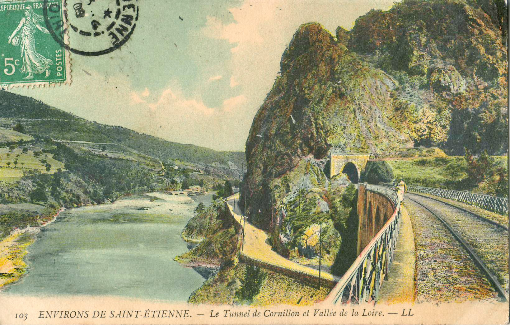 Carte postale ancienne éditée par LL, n°103 : ENVIRONS DE SAINT-ÉTIENNE - Le Tunnel de Cornillon et Vallée de la Loire